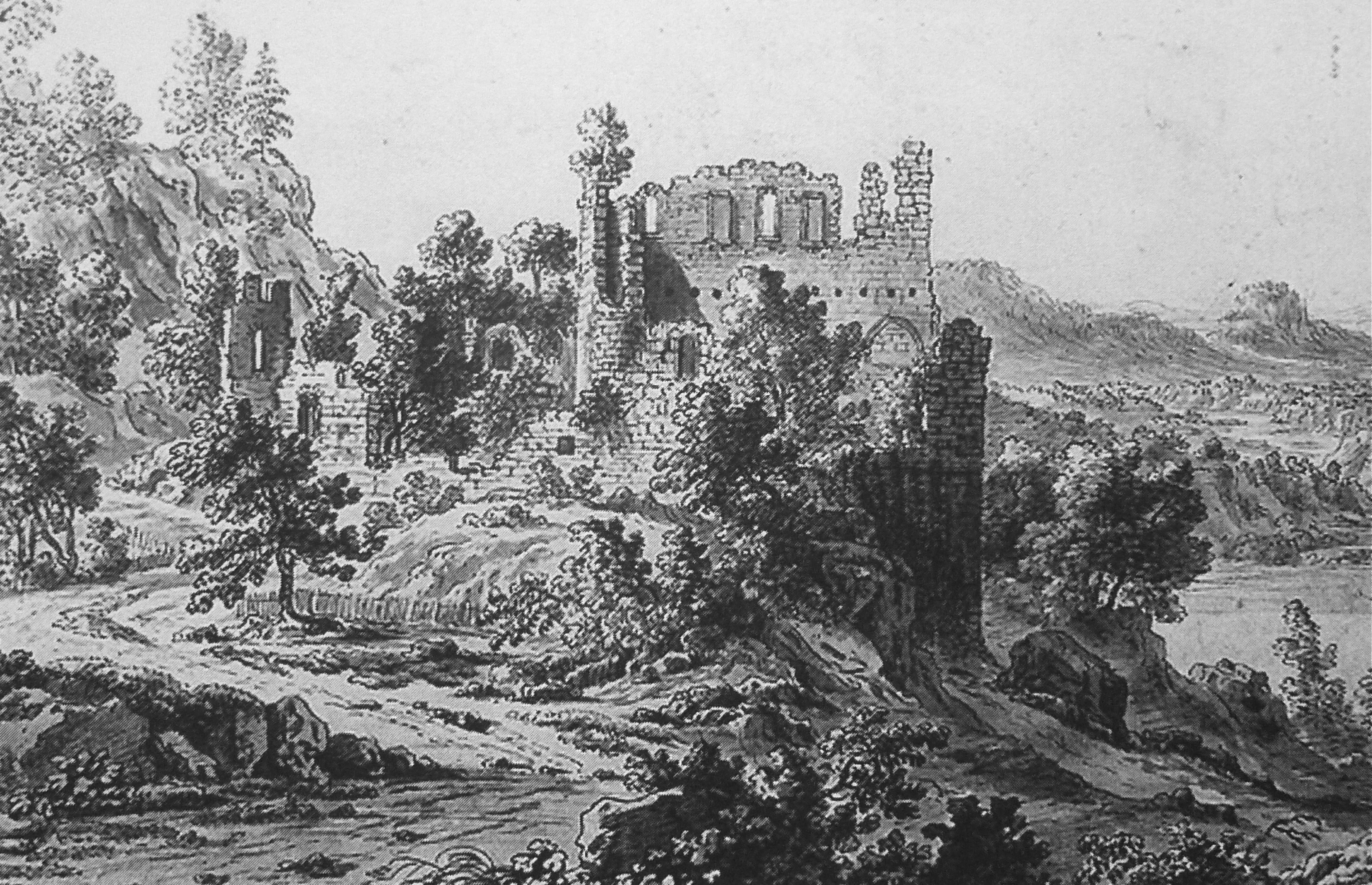 Kirchenruine Beerenberg von SE; Federzeichnung von Felix Meyer (1653 - 1713)